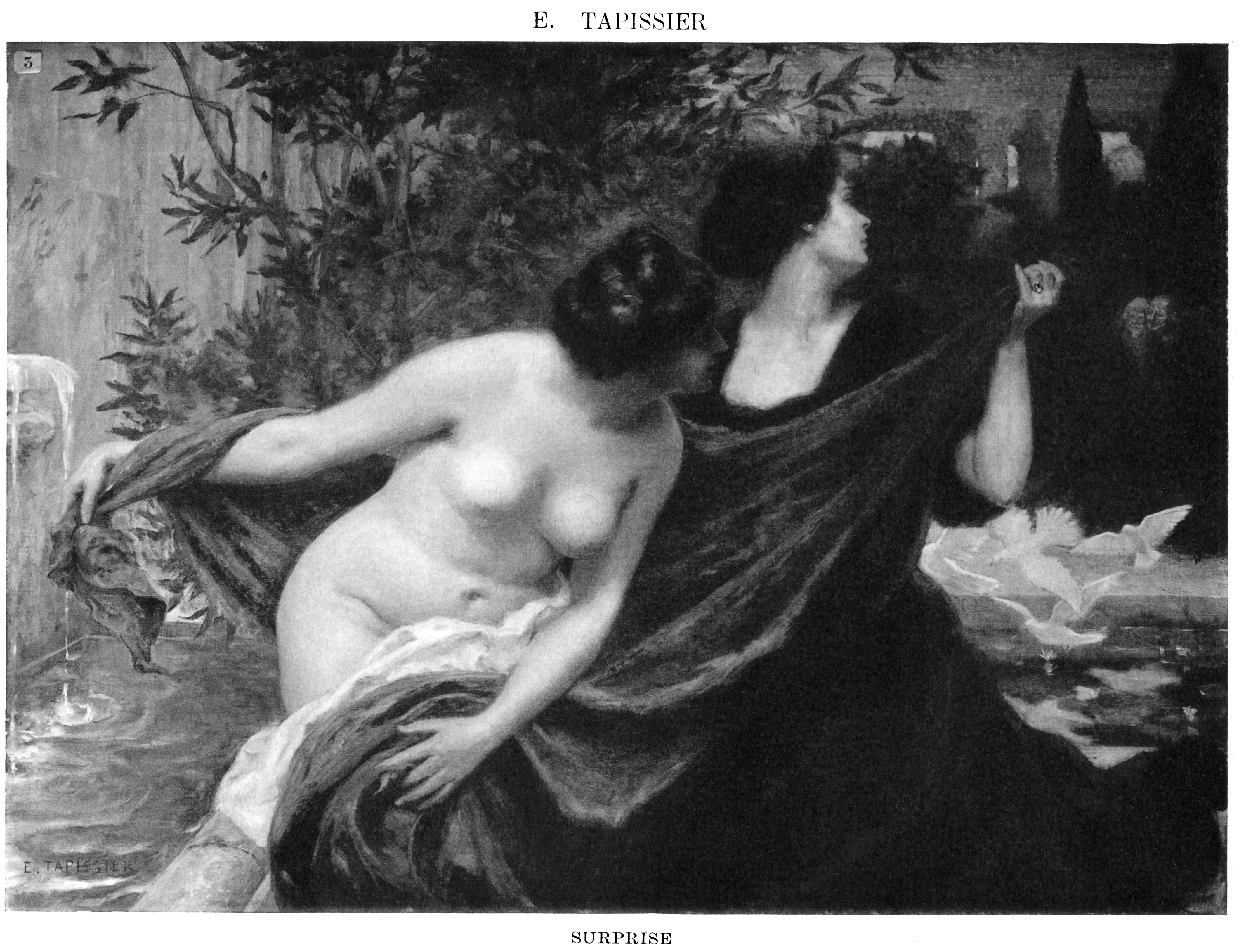 Surprise, par E. Tapissier, Le nu au salon, Paris, 1901, 3me série, 1er volume; internal page: 14 (leaf 7, reverse)